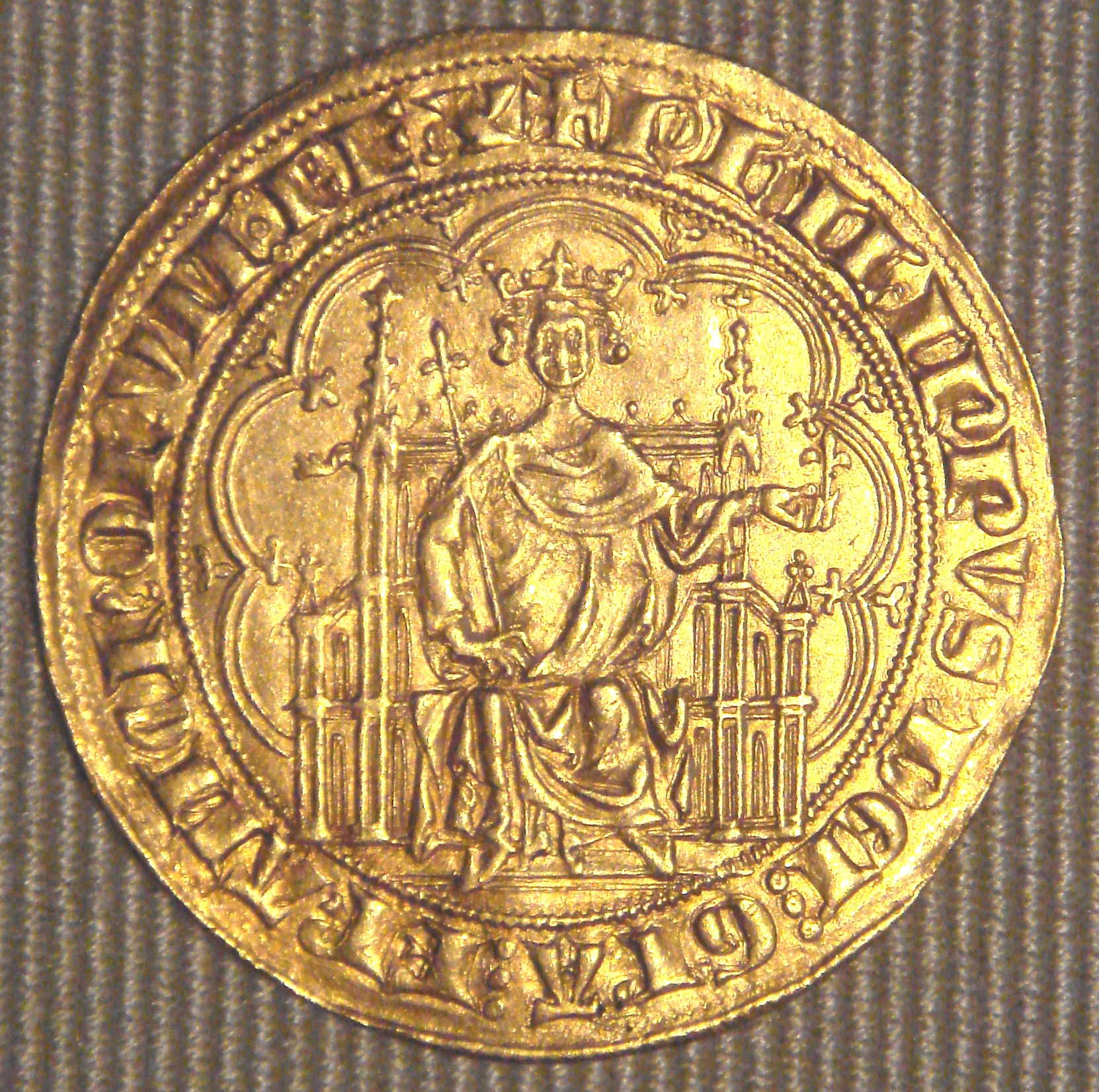 Chaise_d'Or de_Philippe_le_Bel